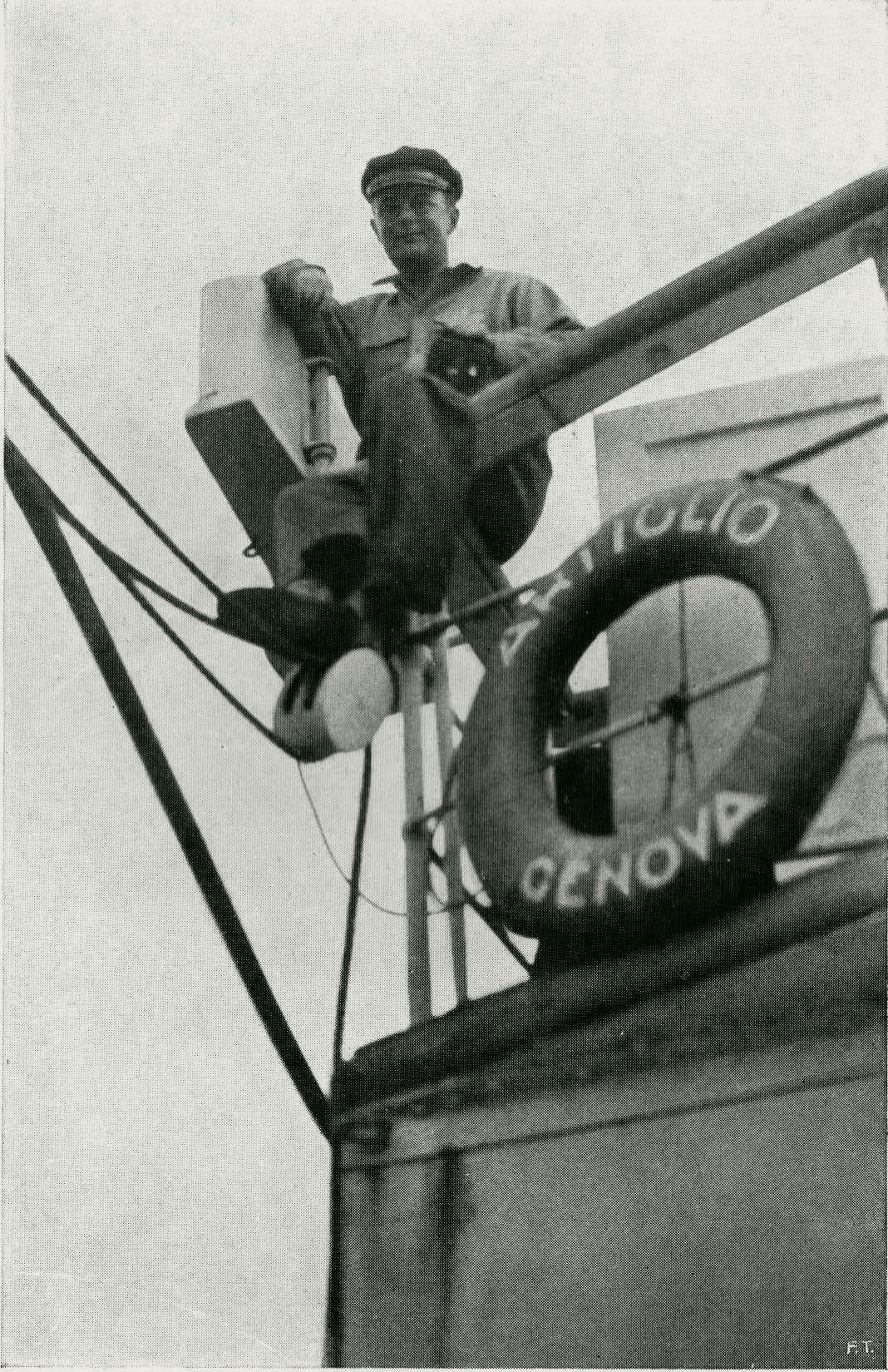 David Scott, special correspondent of The Times, on board of the Artiglio salvage ship